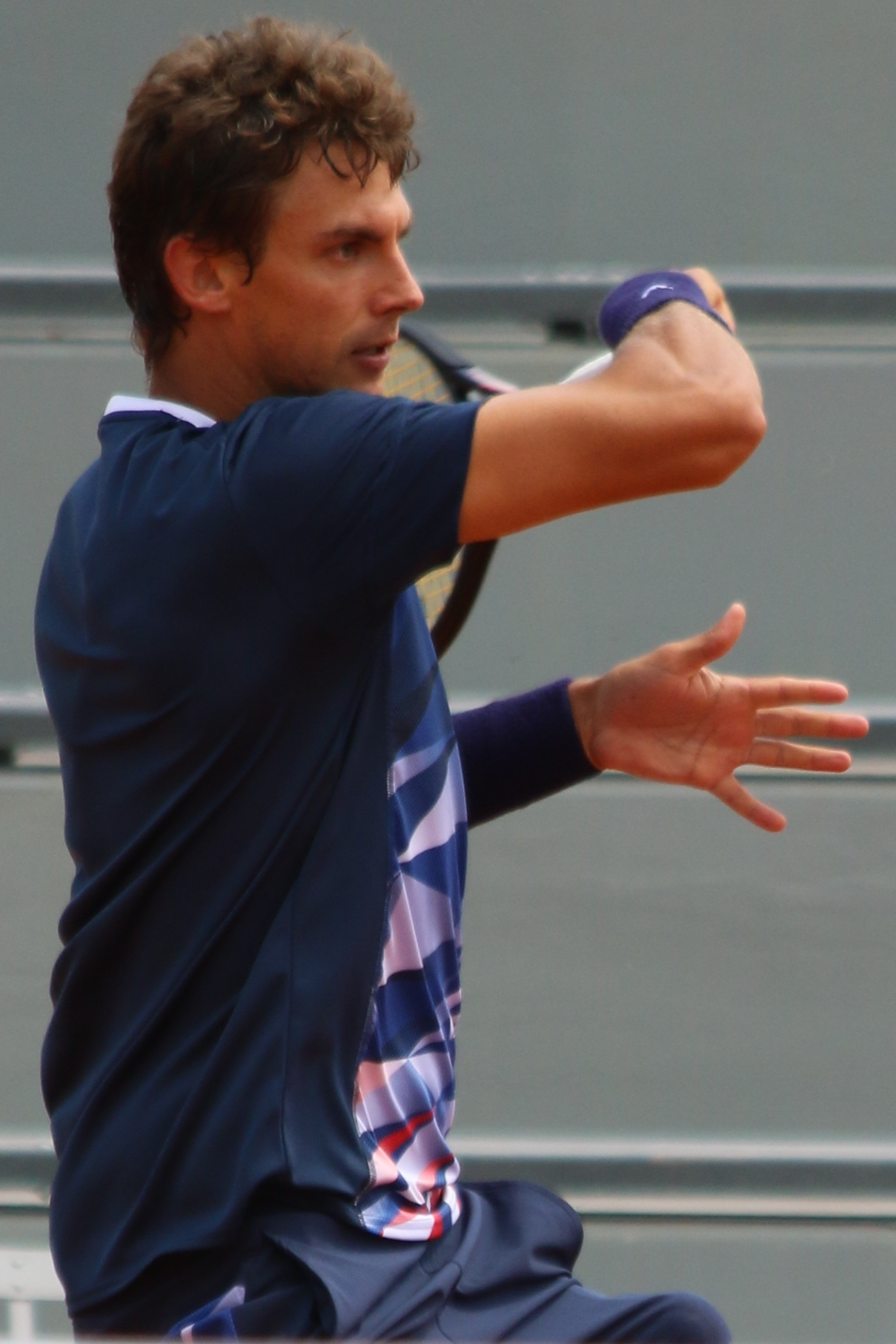 Laaksonen RGQ19 (1)